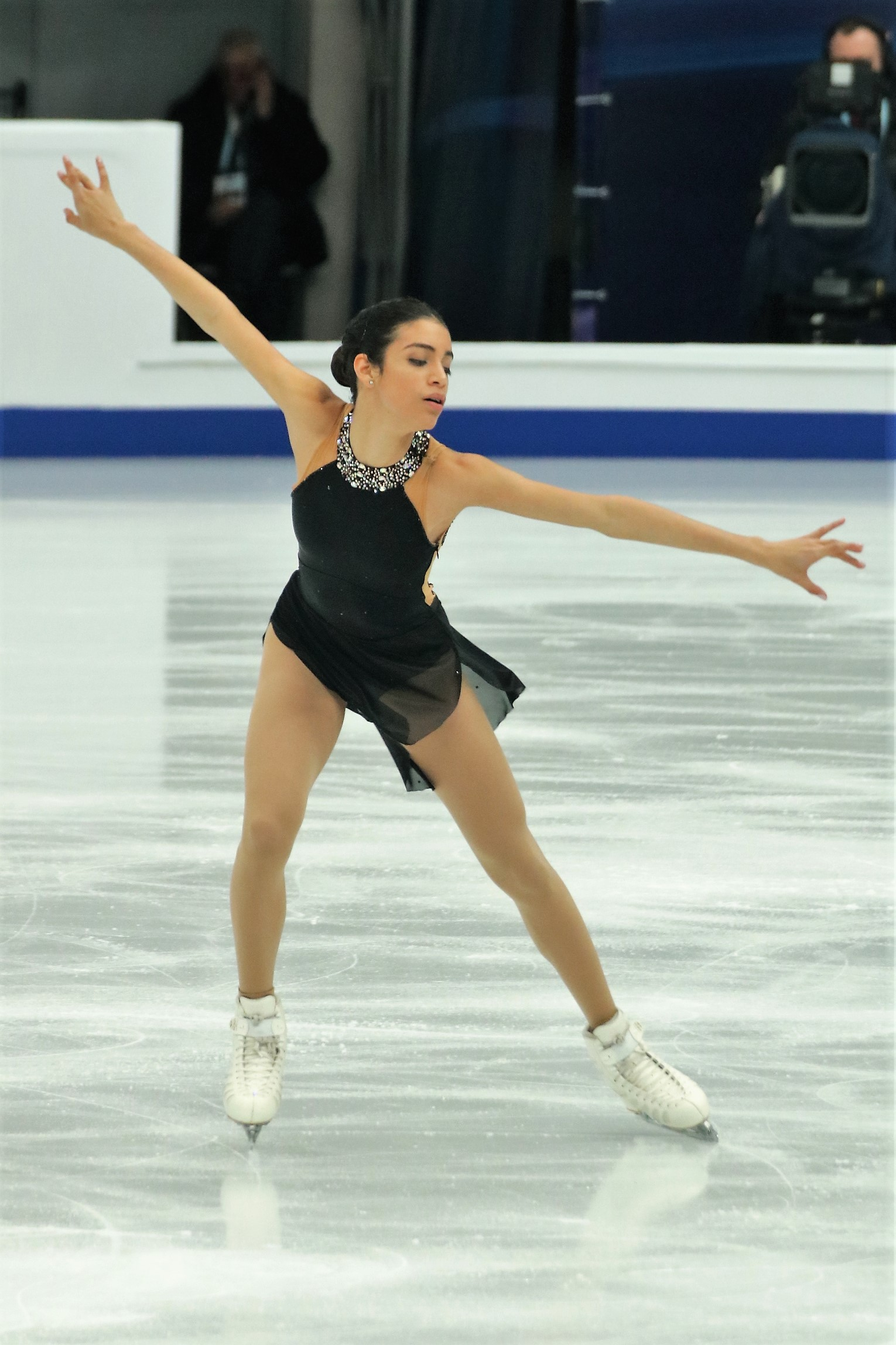 Валентина Матос (Испания) на Чемпионате Европы по фигурному катанию 2018